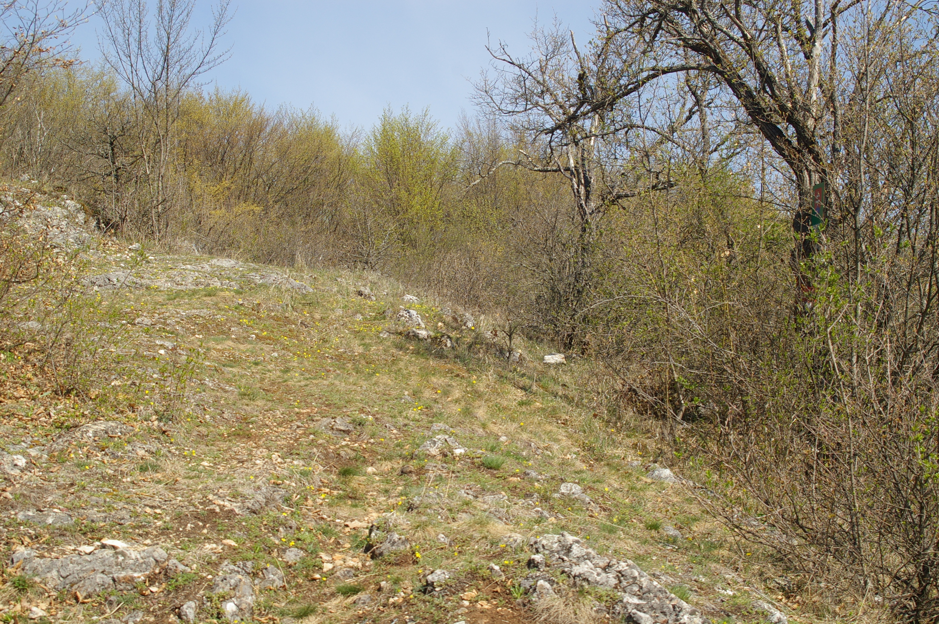 Konariaská planina - řídká vegetace na vápenci